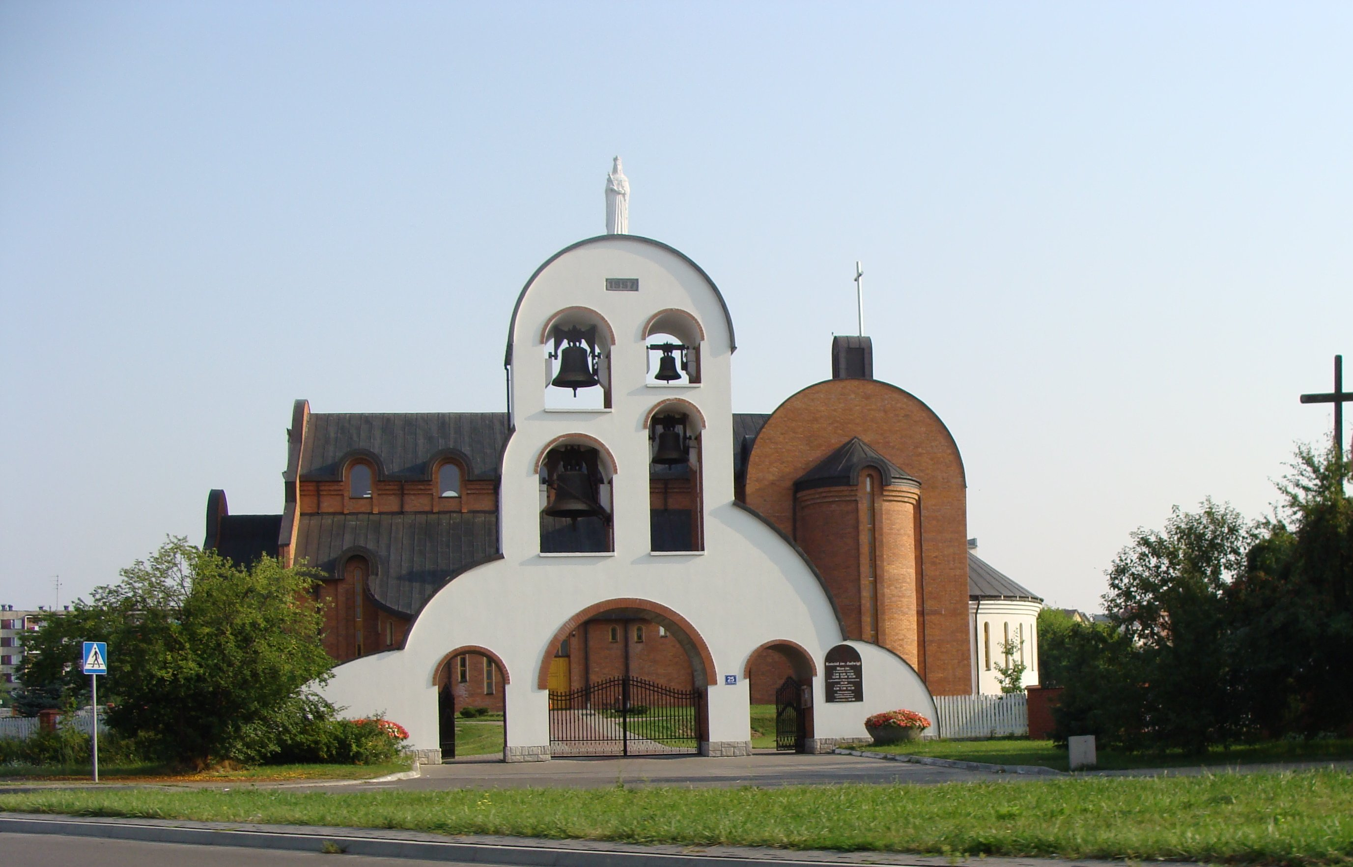 Brama-dzwonnica przy kościele św. Jadwigi w Janowie Lubelskim